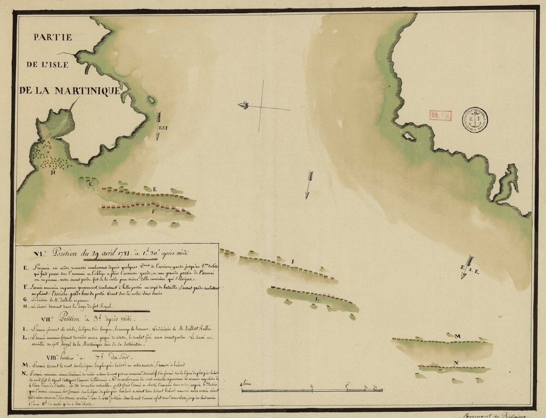 Carte montrant les positions de l'affrontement du 29 avril 1781 entre les flottes françaises et anglaises au large de la Martinique. Guerre d'Indépendance américaine. Carte en français.